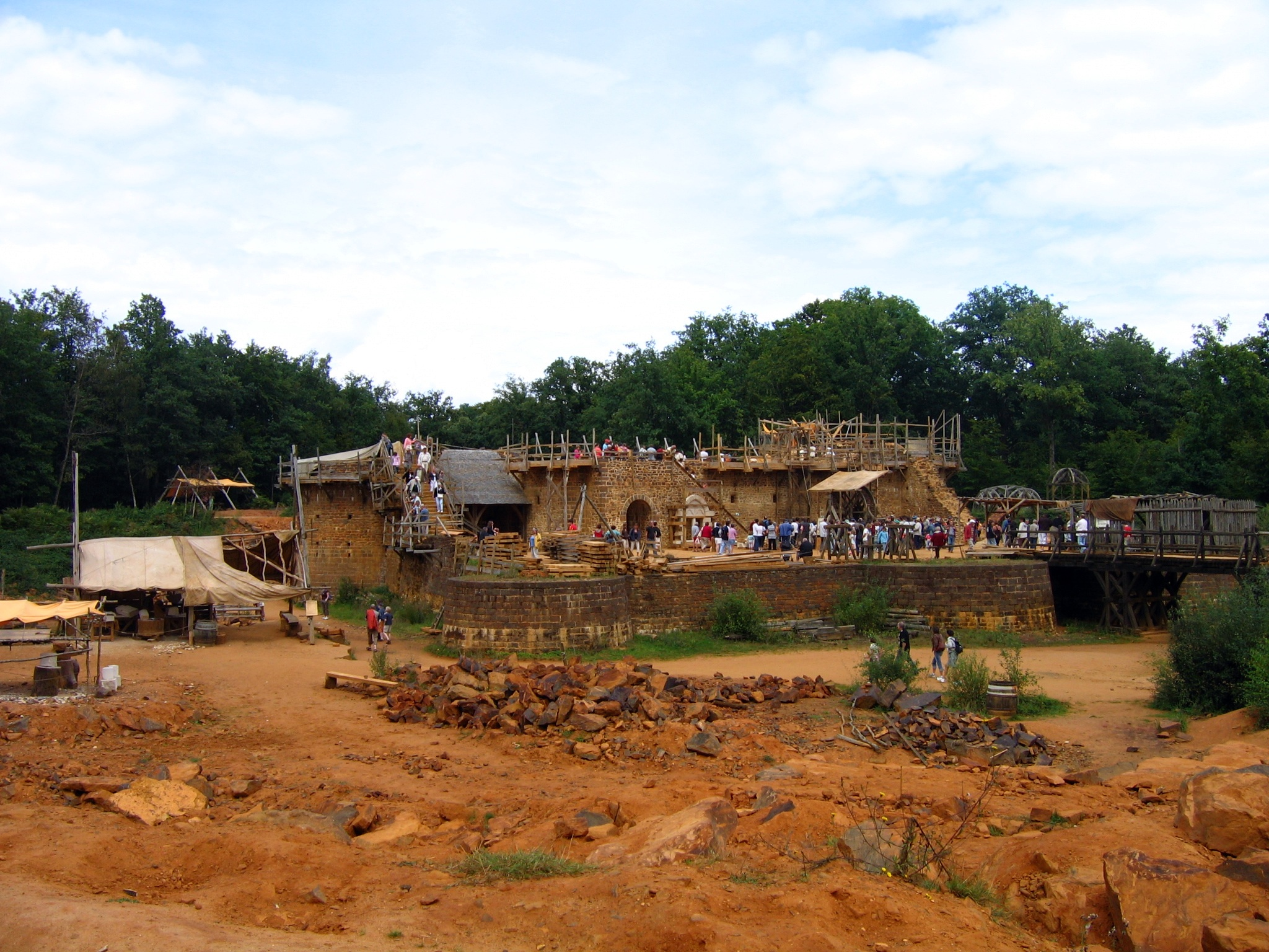 château de guédelon en août 2007 (Yonne)